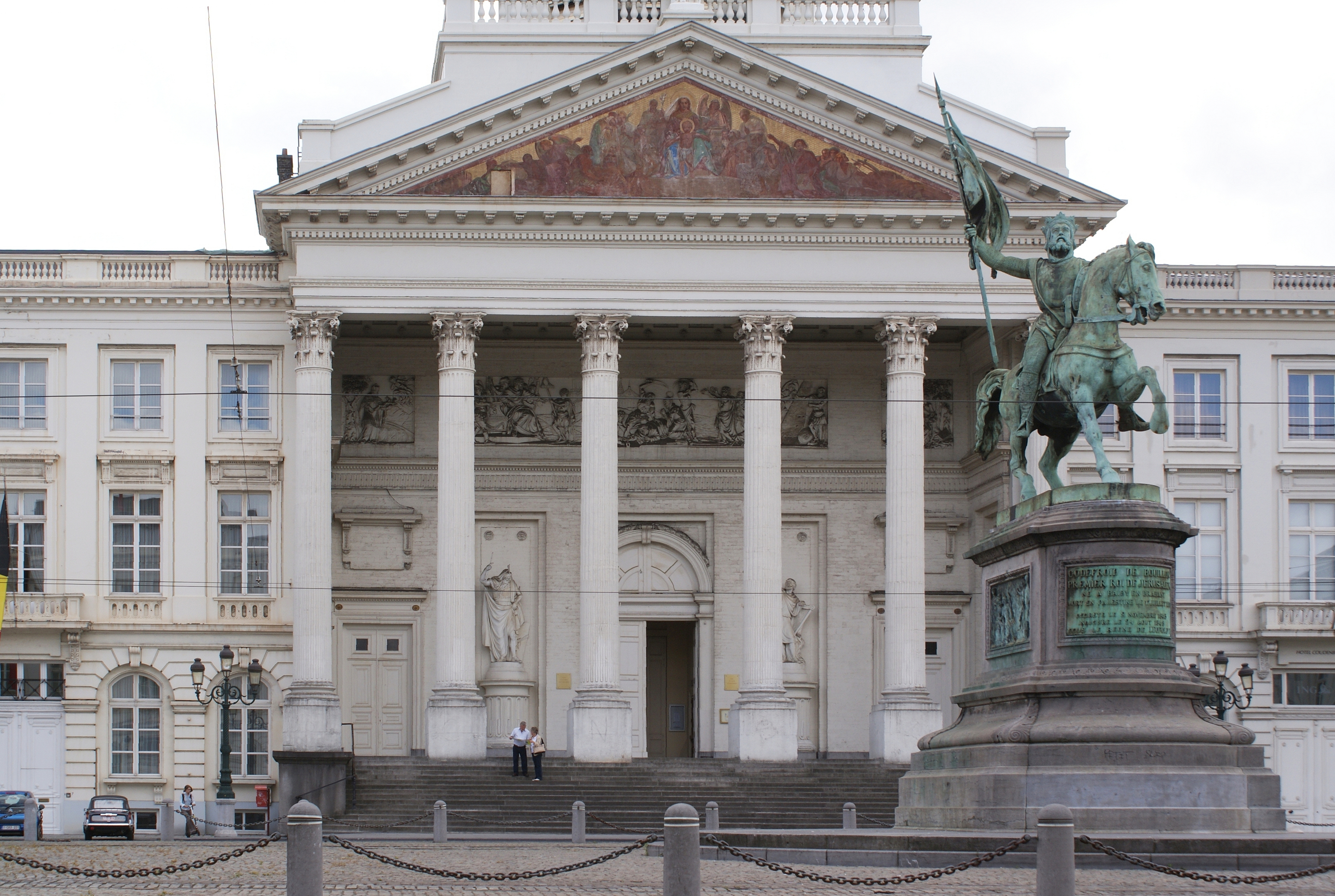 Sint-Jacobskerk-op-Koudenberg - Voorgevel met zuilengallerij en standbeeld van Godfried van Bouillon